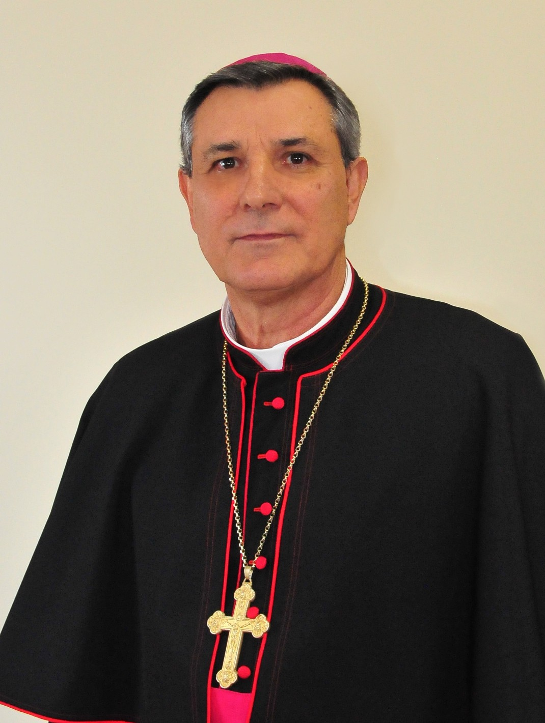 domlanza